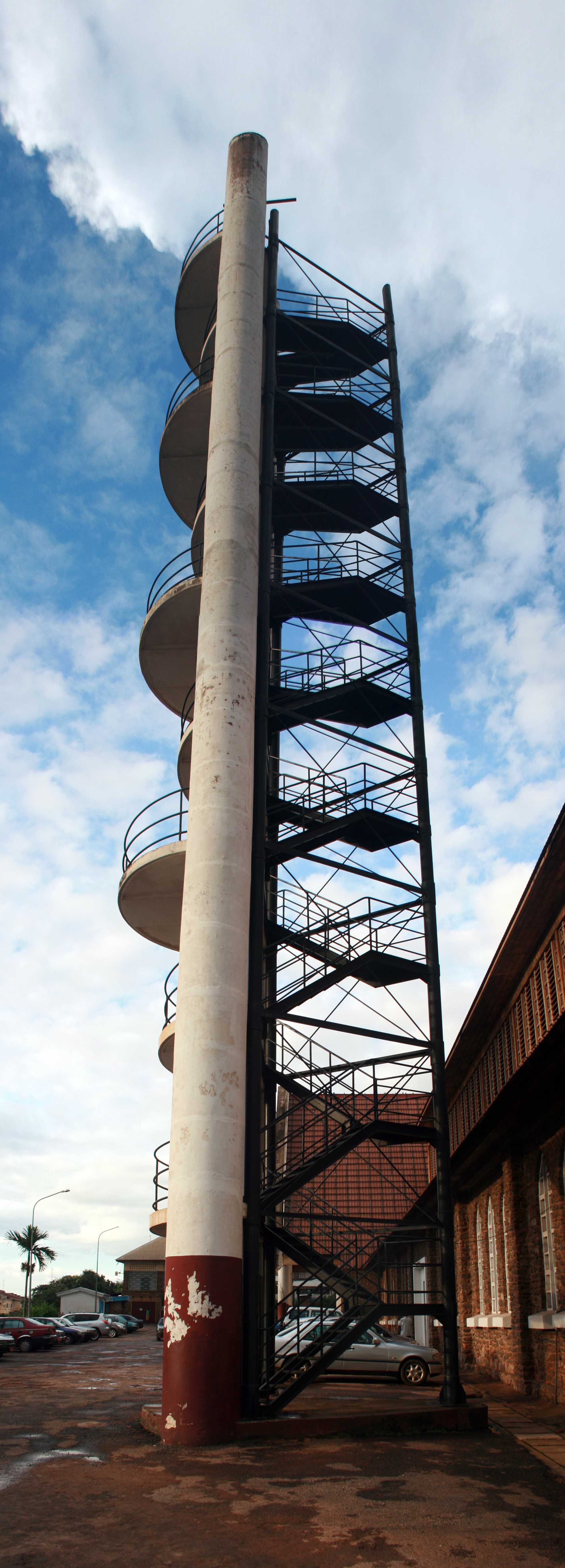 Cathédrale Notre Dame de Victoire de Yaoundé